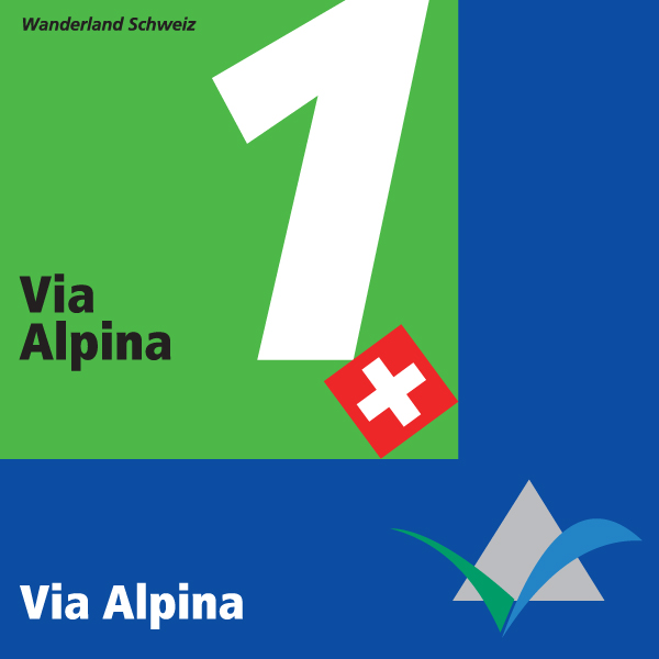 Wegzeichen der Via Alpina in der Schweiz.